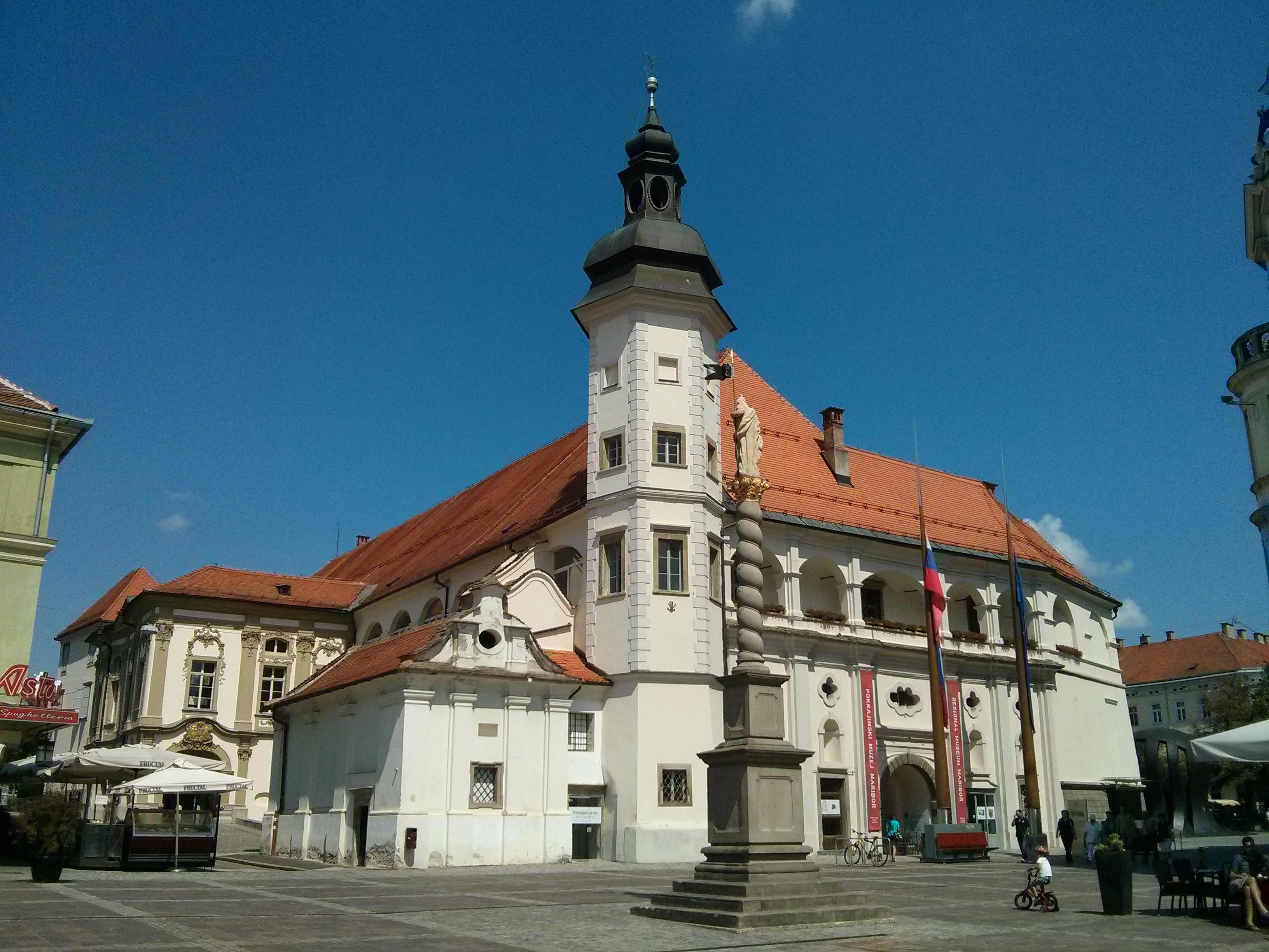 Grajski trg